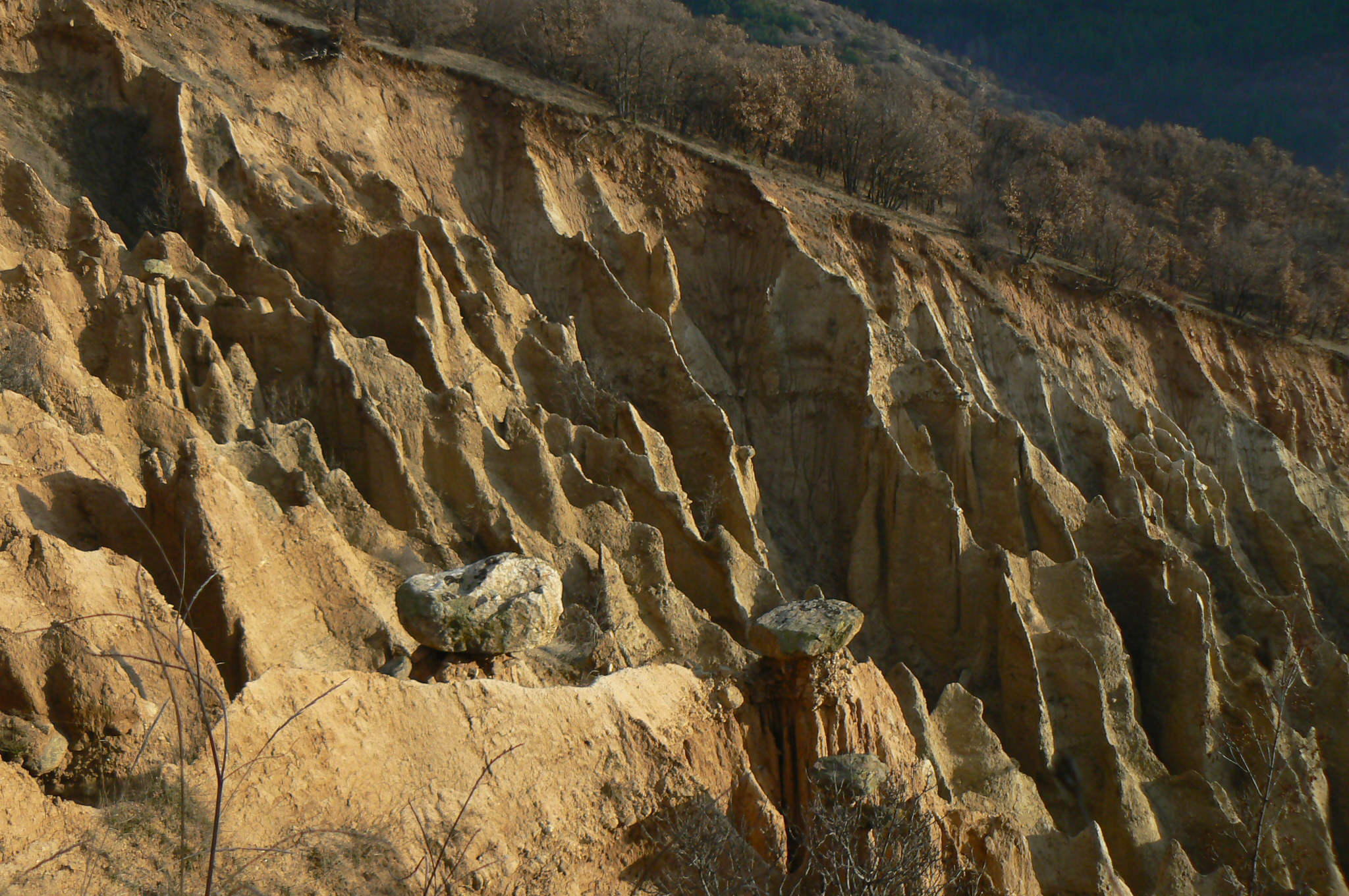 Стобските пирамиди, Рила планина, България. Stob pyramids, Rila mountain, Bulgaria